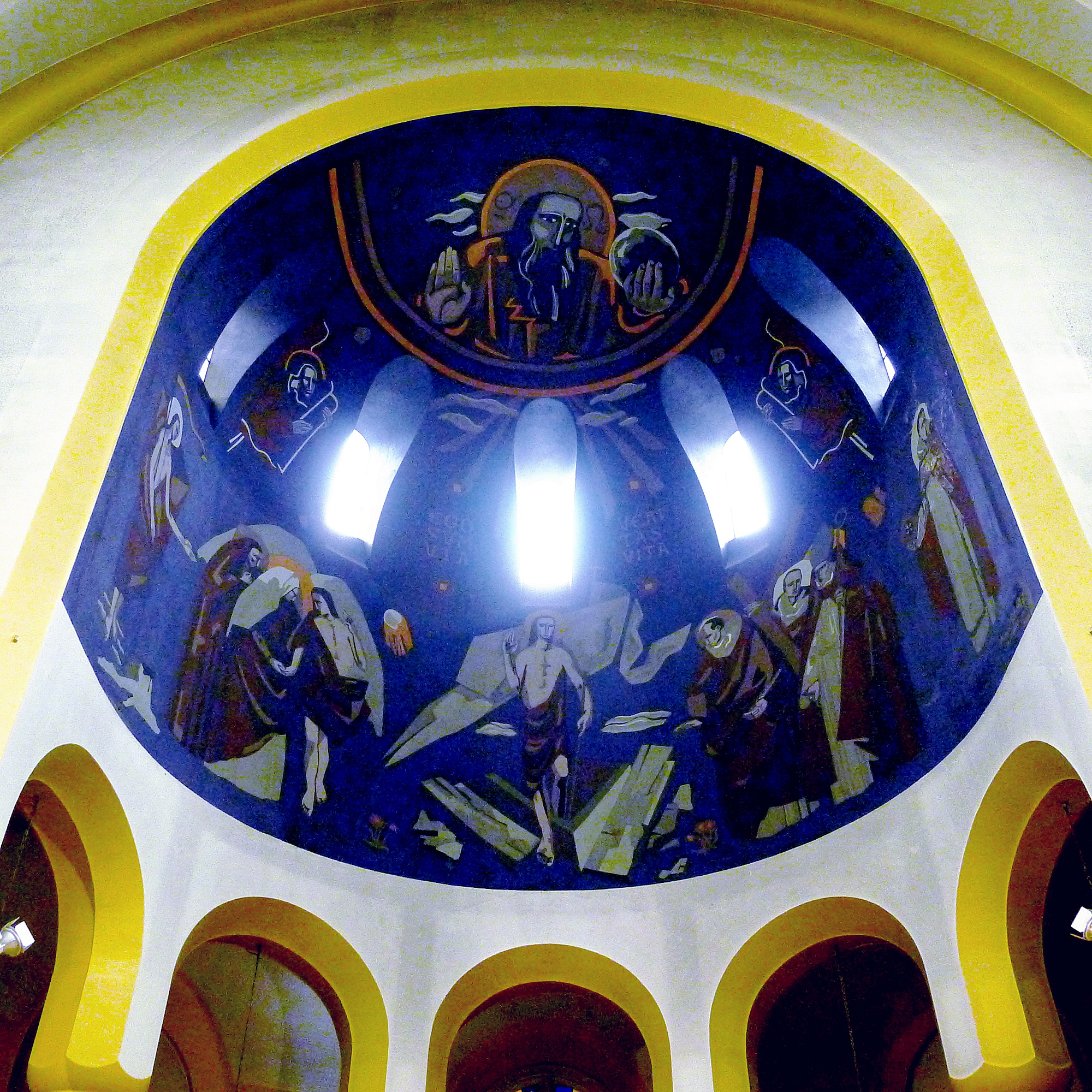 Église Saint-Dominique (coupole du choeur) - Paris XIV